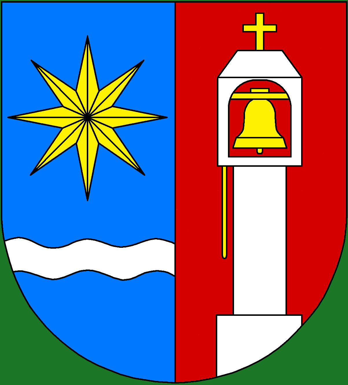 Znak